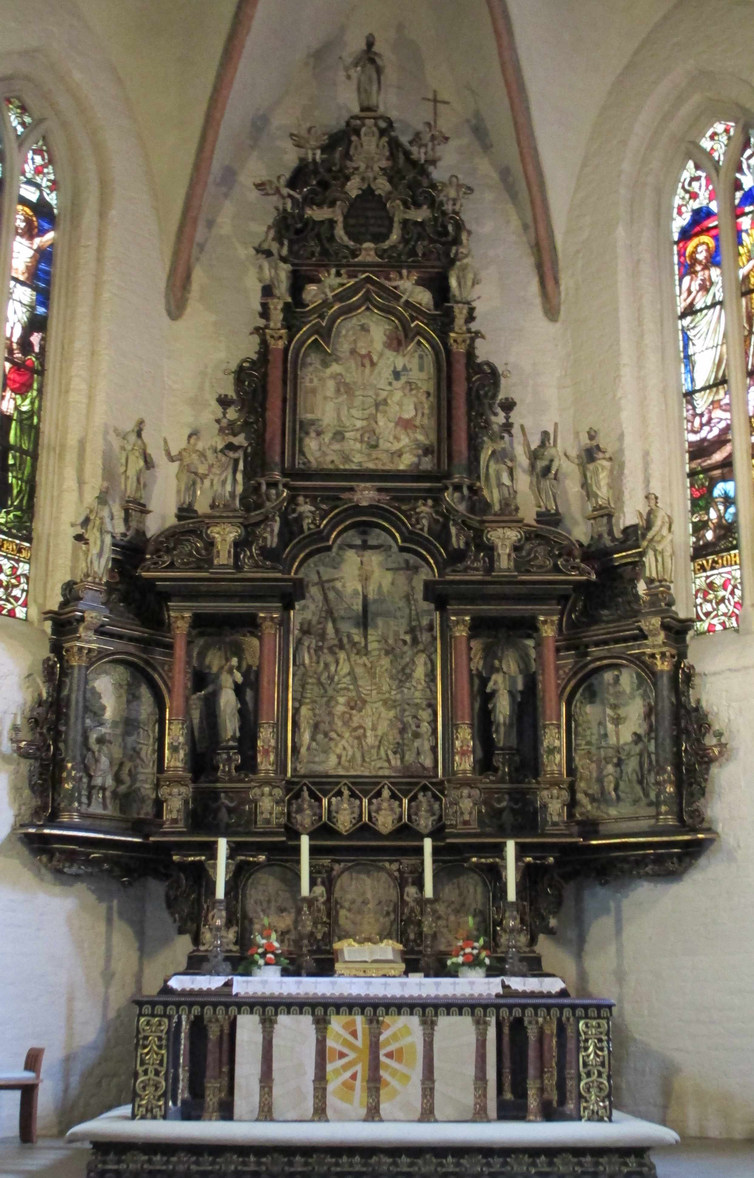 Rendsburg Marienkirche - Altar des Bildschnitzers Hennings Claussen (1648)